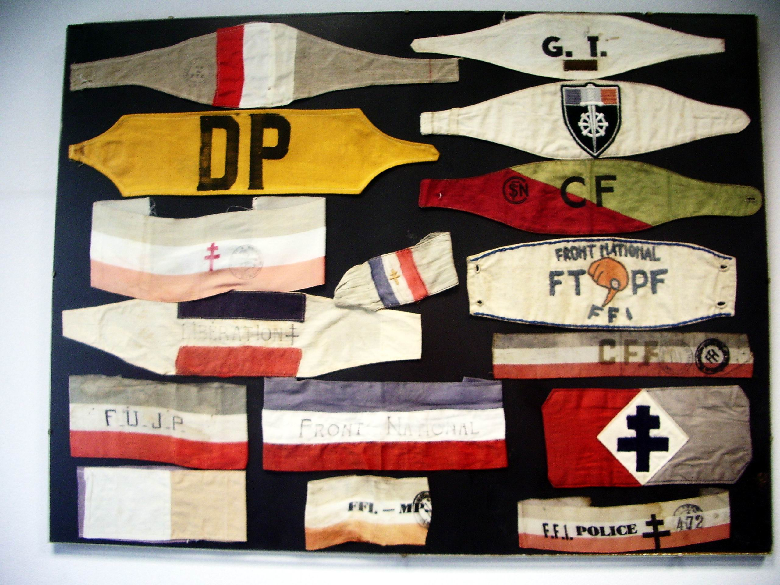 Différends brassrds portés à la Libération.